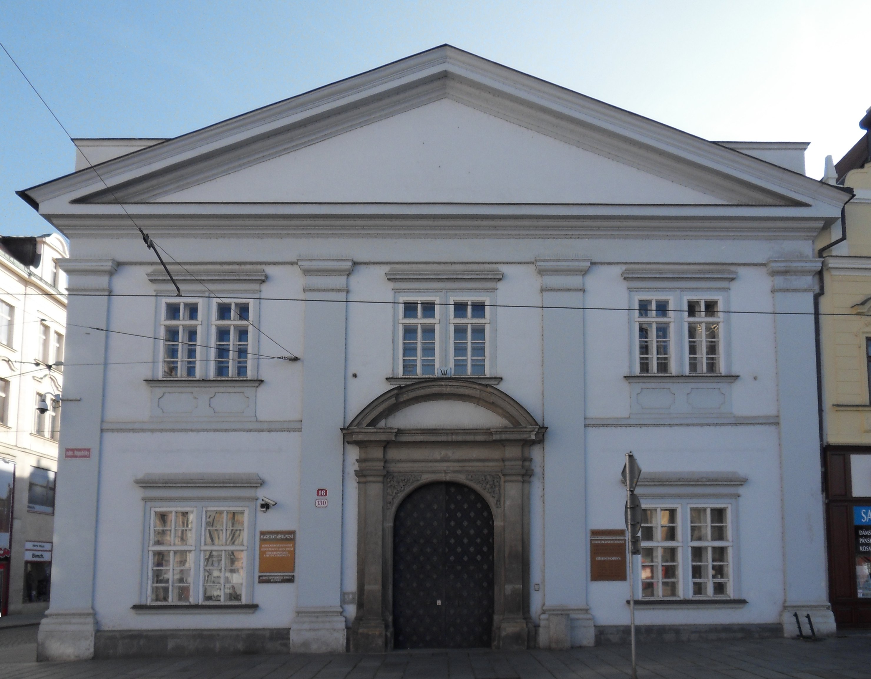 Měšťanský dům - Principálovský dům, čp. 130, nám. Republiky 16, Plzeň